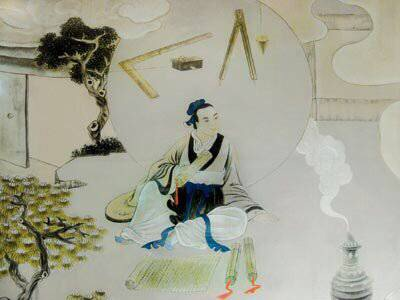 墨子。中国墨子協会より。